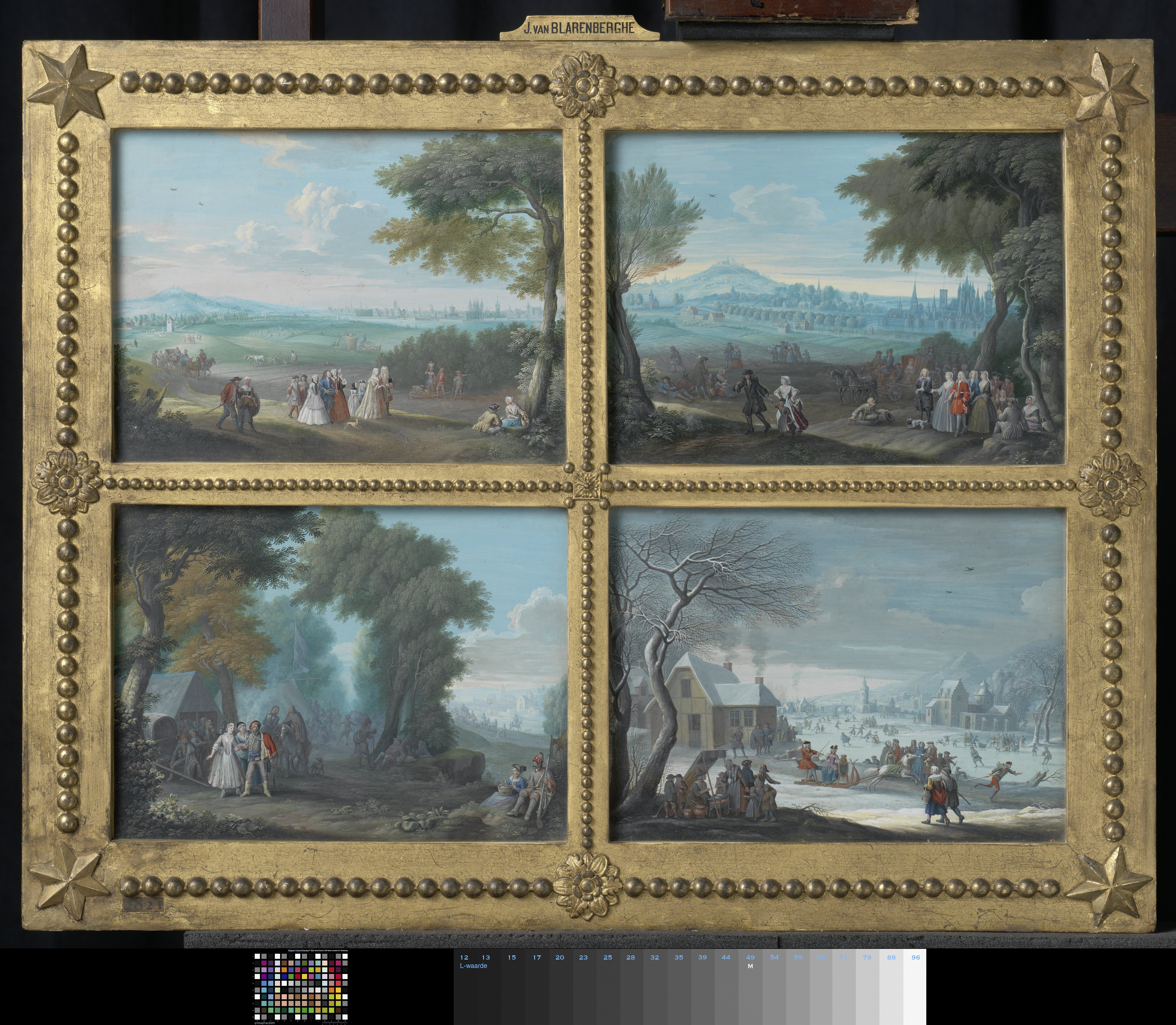 Geheel opgebouw uit vier losse panelen met vier landschappen, de vier jaargetijden voorstellend. Linksonder voorjaar, linksboven zomer, rechtsboven herfst, rechtsonder winter. Voorjaar: tentenkamp met soldaten, huifkar en marketentsters. Zomer: landschap met wandelaars. Herfst: landschap met elegant gezelschap en een bedelaar. Winter: dorpsgezicht met ijsvermaak, wafelbakster en schaatsers.